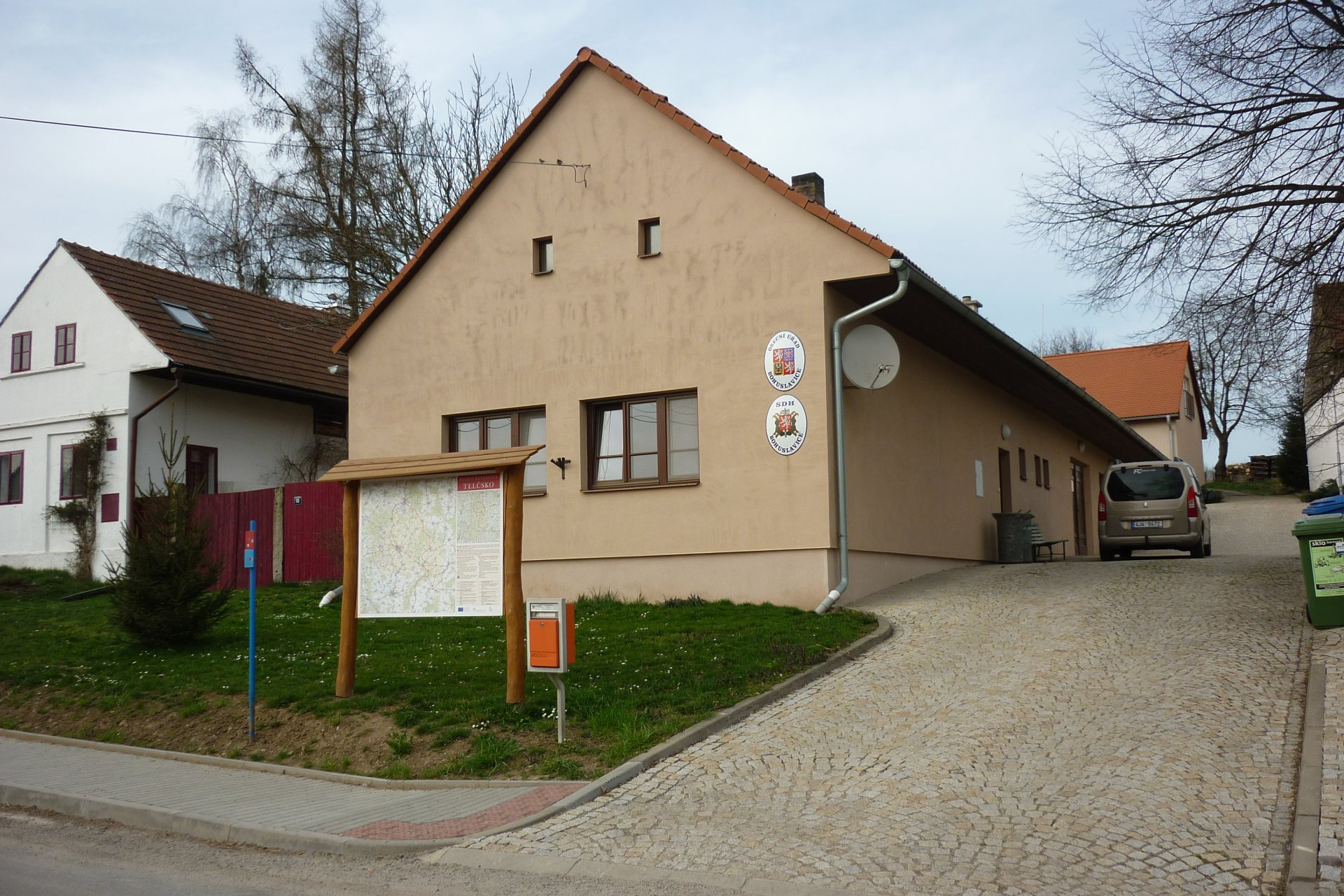 Bohuslavice, obecní úřad